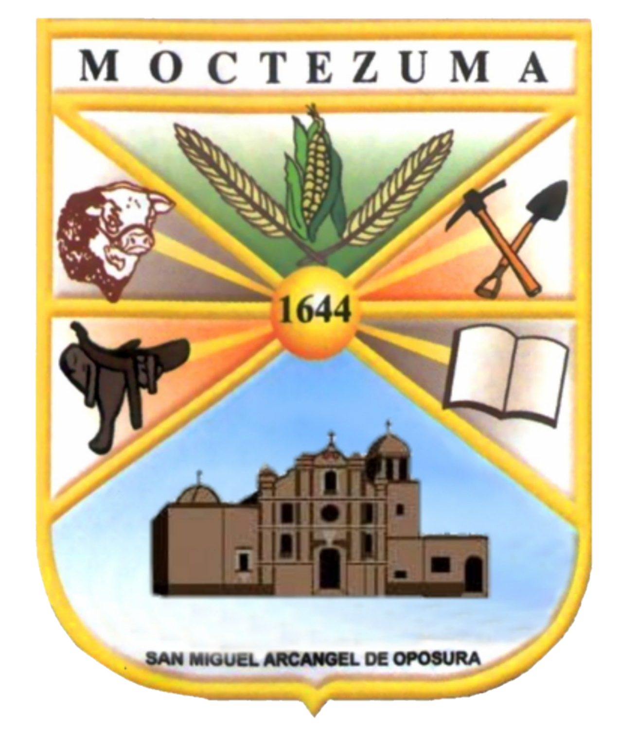 Escudo del municipio sonorense.